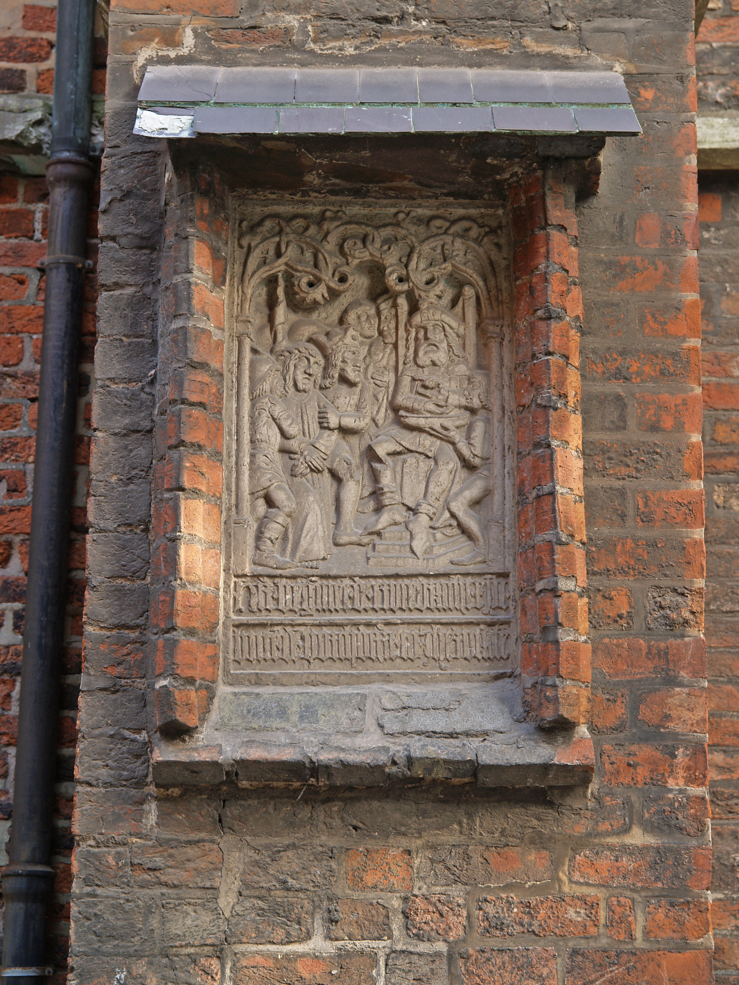 Kreuzwegstation an der Außenmauer der St. Jakobi Kirche in Lübeck